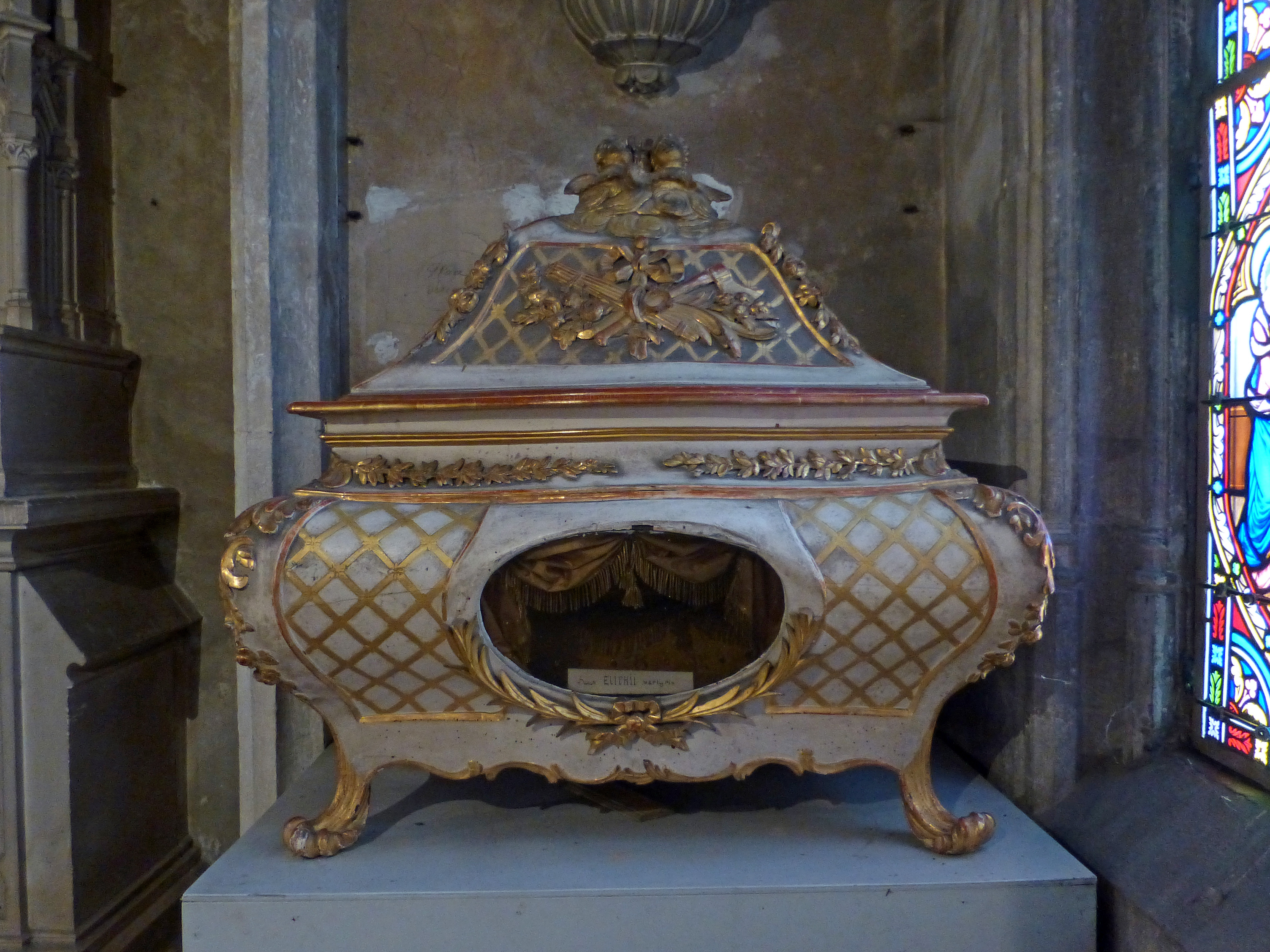 Intérieur de l'église Saint-Nicolas de Neufchâteau (Vosges). Reliques portant l'inscription Sancti Eliphii Martyris